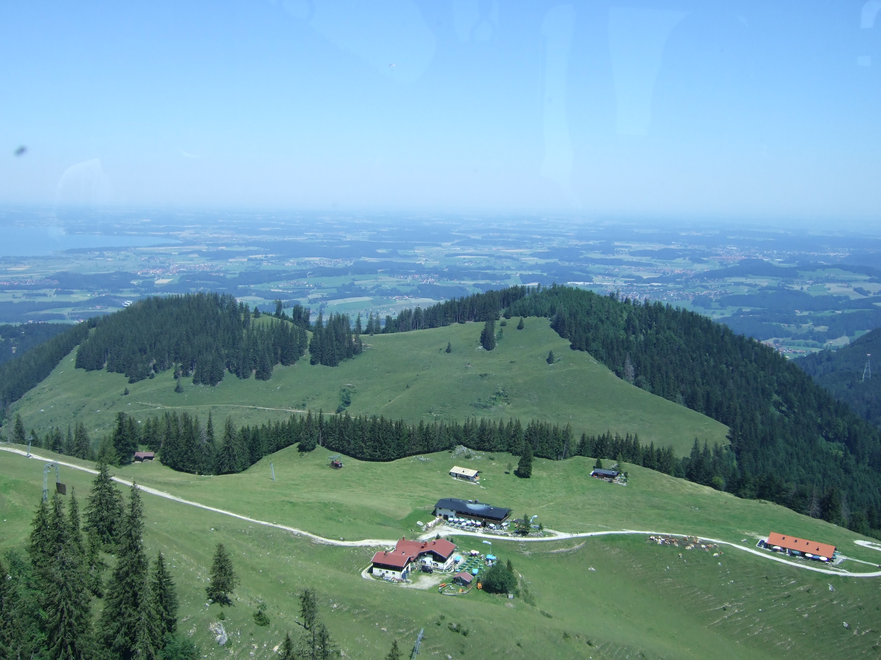 Mittelstation Almen auf dem Hochfelln